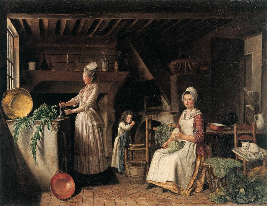 Intérieur de cuisine provençale, vers 1776-80